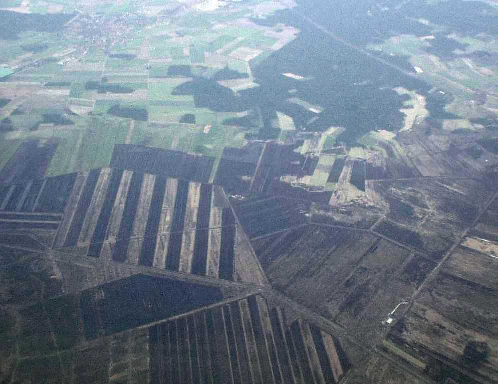 Torfstich nördlich vom Steinhuder Meer